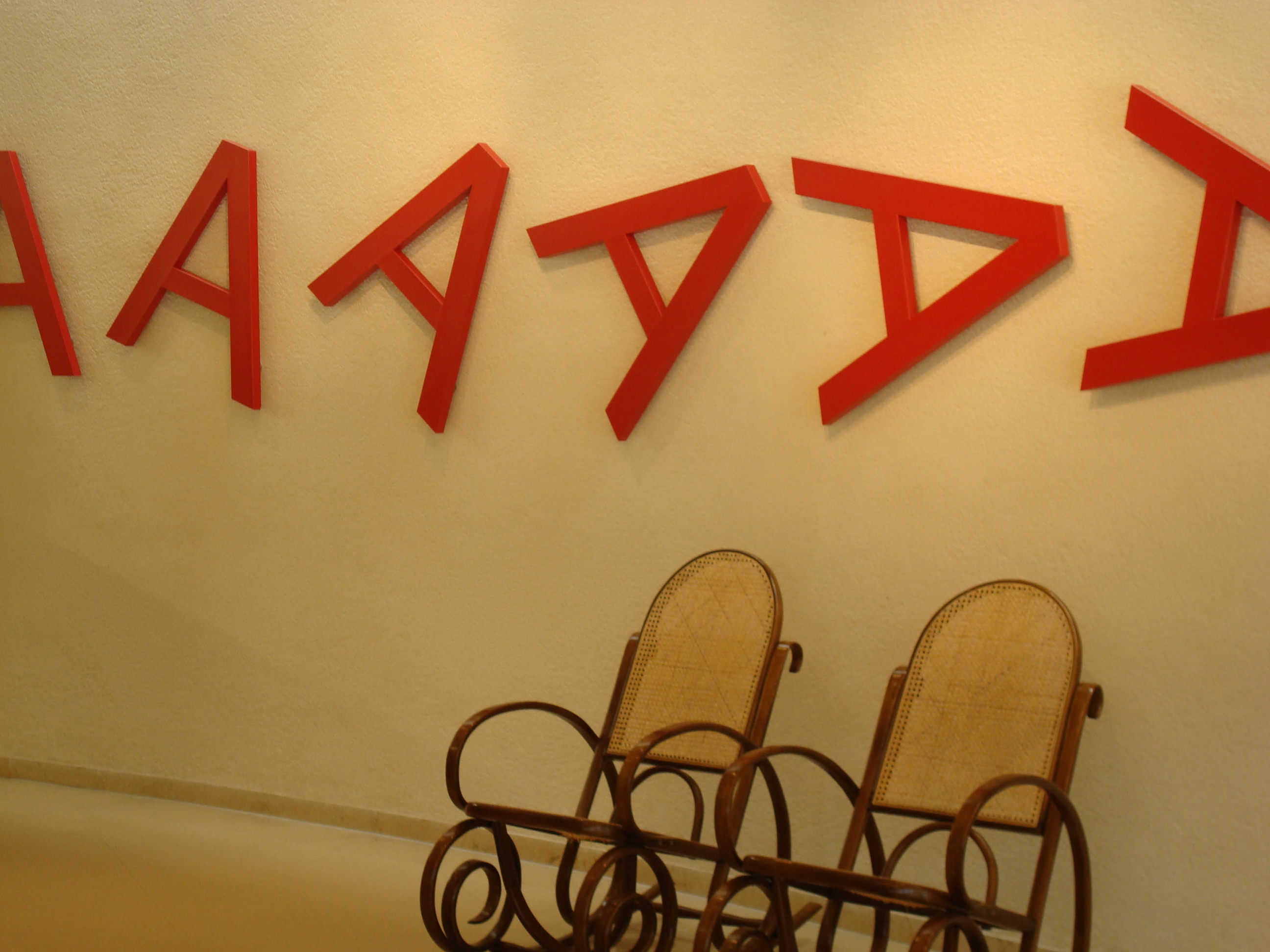 Lletra Ballarina de Joan Brossa instal·lada a la Biblioteca Santa Oliva d'Olesa de Montserrat.